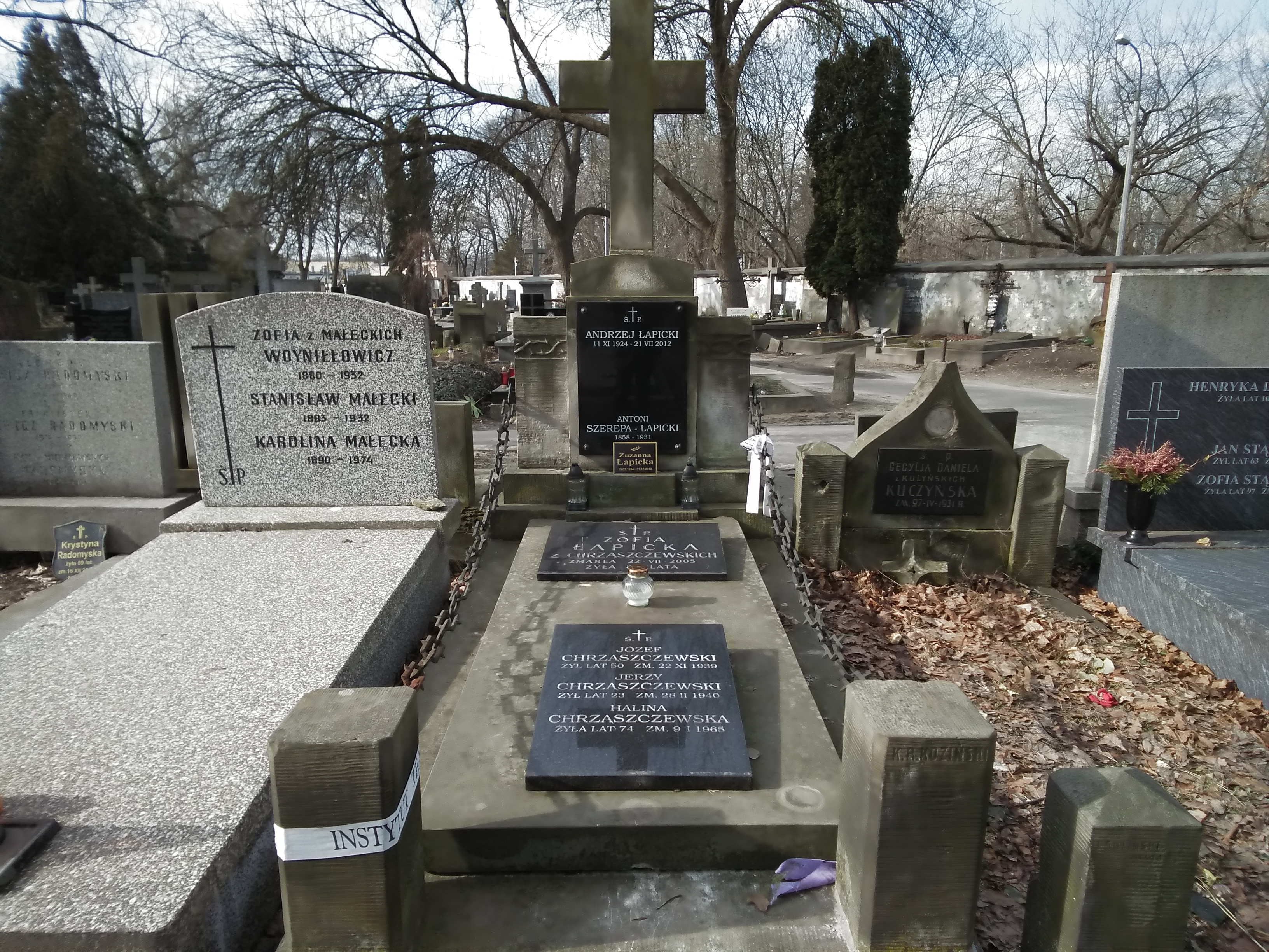 Grób Andrzeja Łapickiego i jego córki Zuzanny na cmentarzu powązkowskim